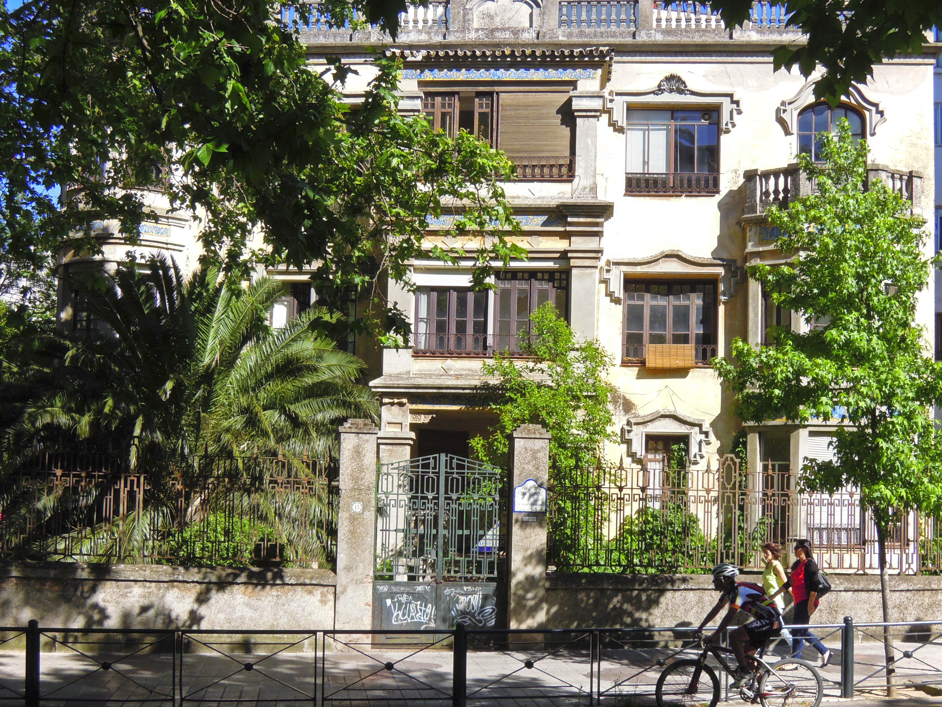 Palacio de "Los Málaga"